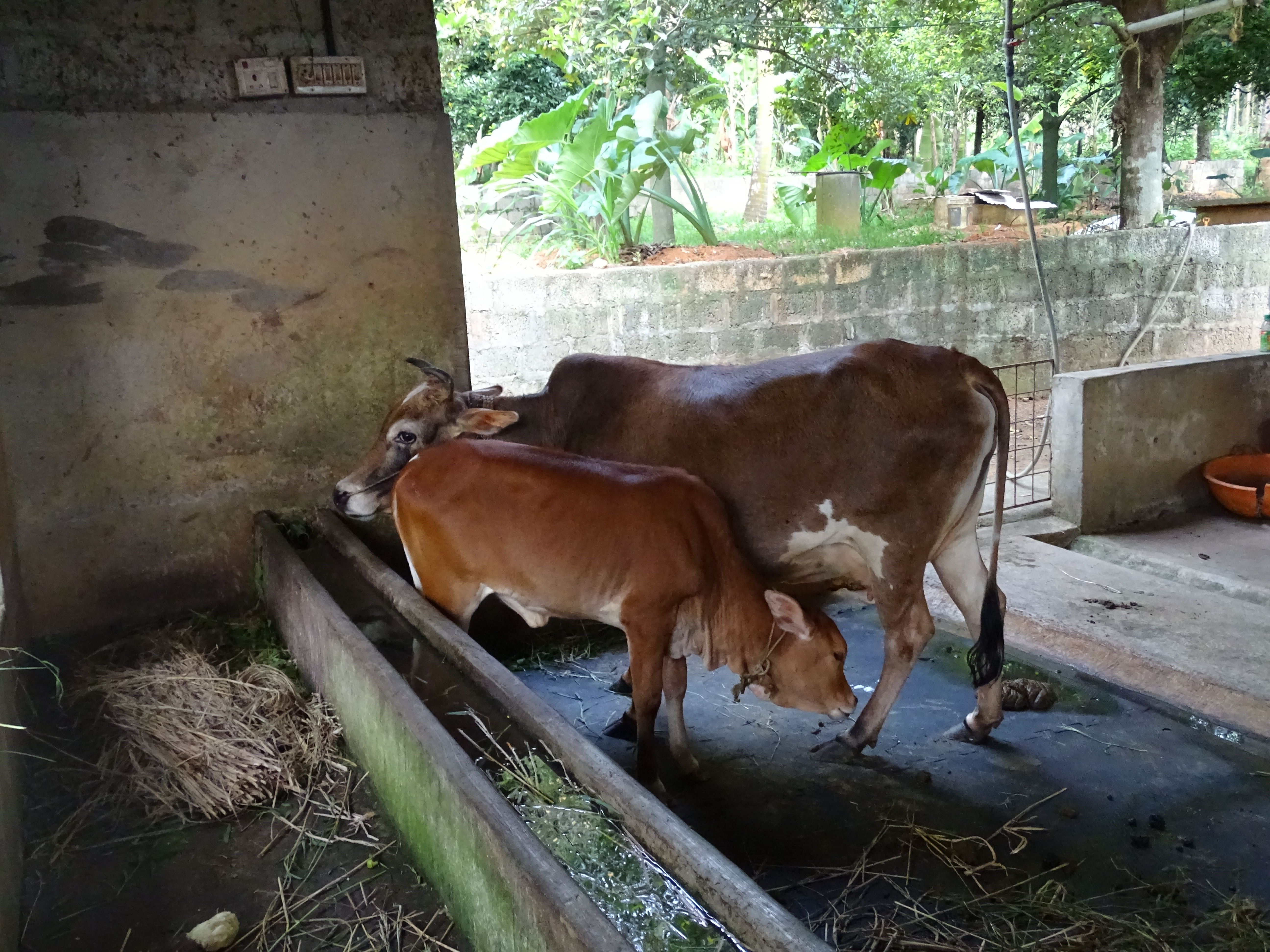 എരയാംകുടി യിലെ ജയശ്രീ യുടെ ഫാമില്‍ നിന്ന്.